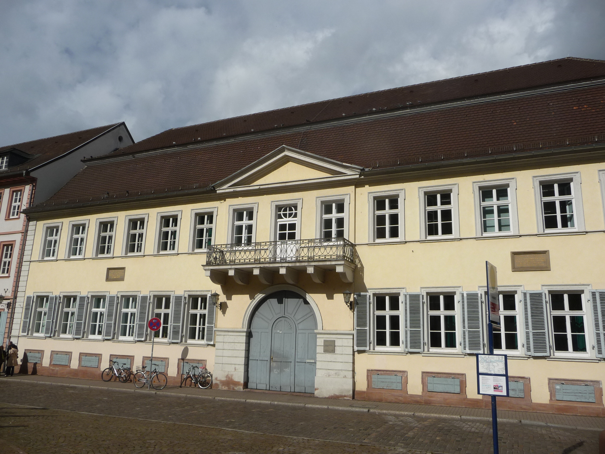 Das Palais Boisserée ist ein Gebäude an der Nordseite des Karlsplatzes in der Altstadt von Heidelberg.